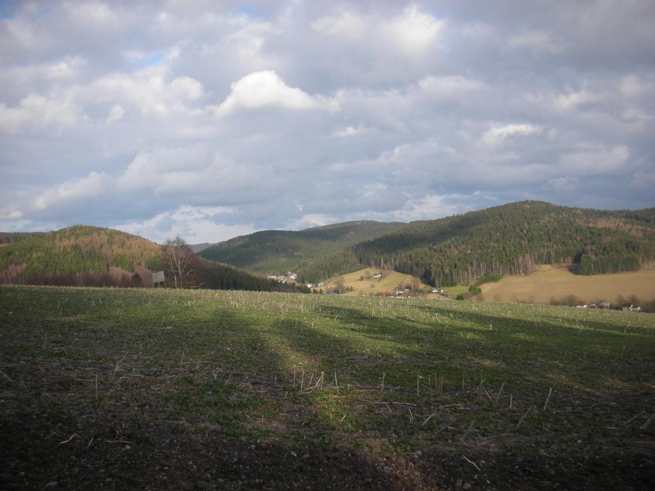 Blick von der Spornreuth (Erlbach) auf den Kegelberg in Richtung Ursprungberg (höchster Berg des Elstergebirges)